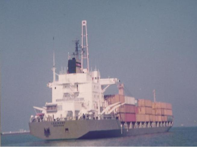 Die Leerort, Typ Rickmers Werft RW 39 im Bittersee